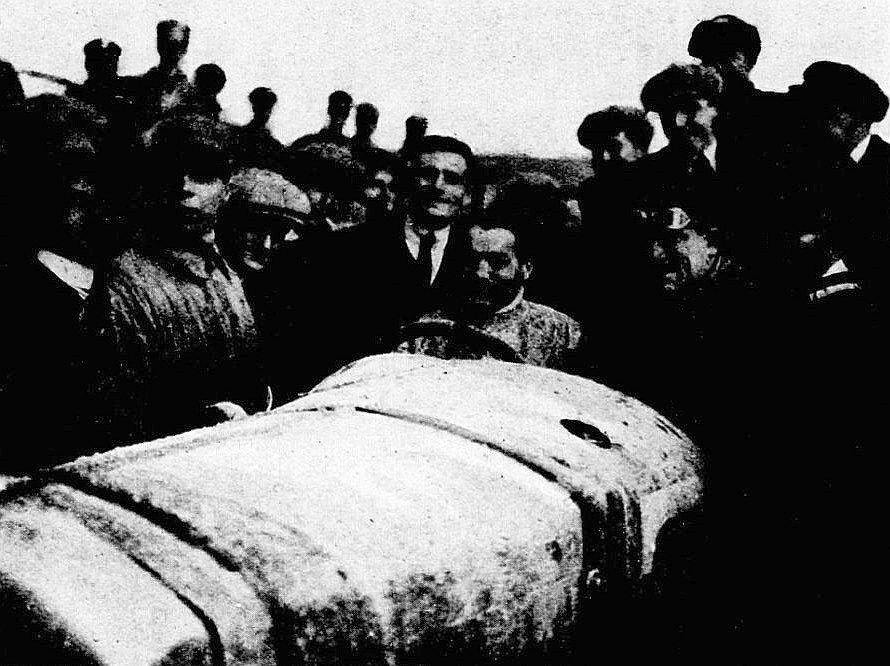 André Boillot, vainqueur de la Coppa Florio en 1922 sur Peugeot aux Madonies Le Monde illustré du 2 décembre 1922, p.456